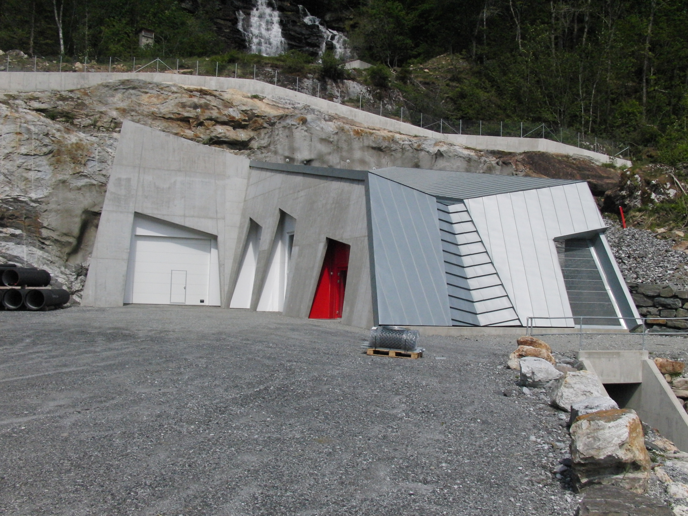 Folkedal kraftverk